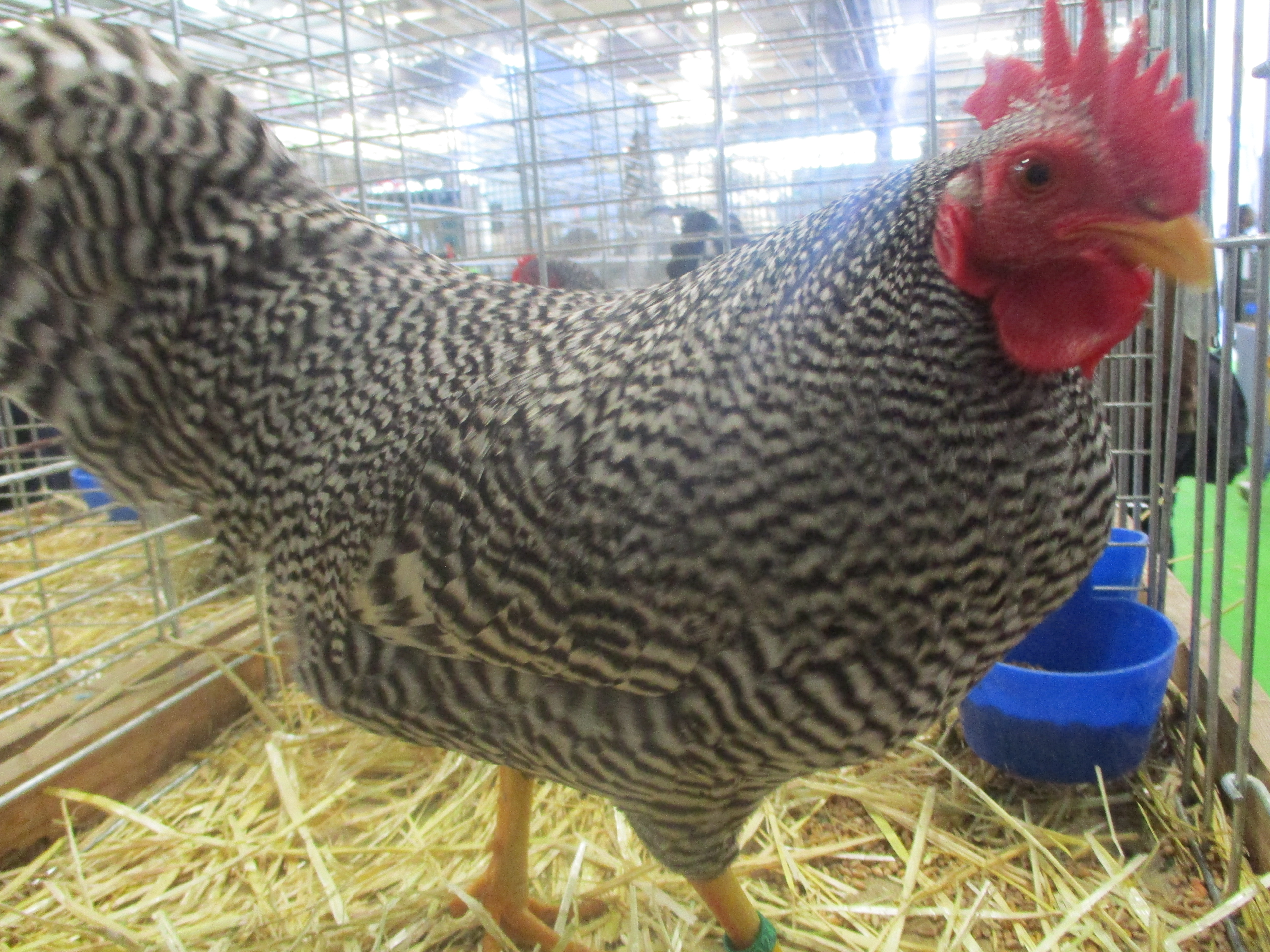 Coq amrock barré au SIA 2020.